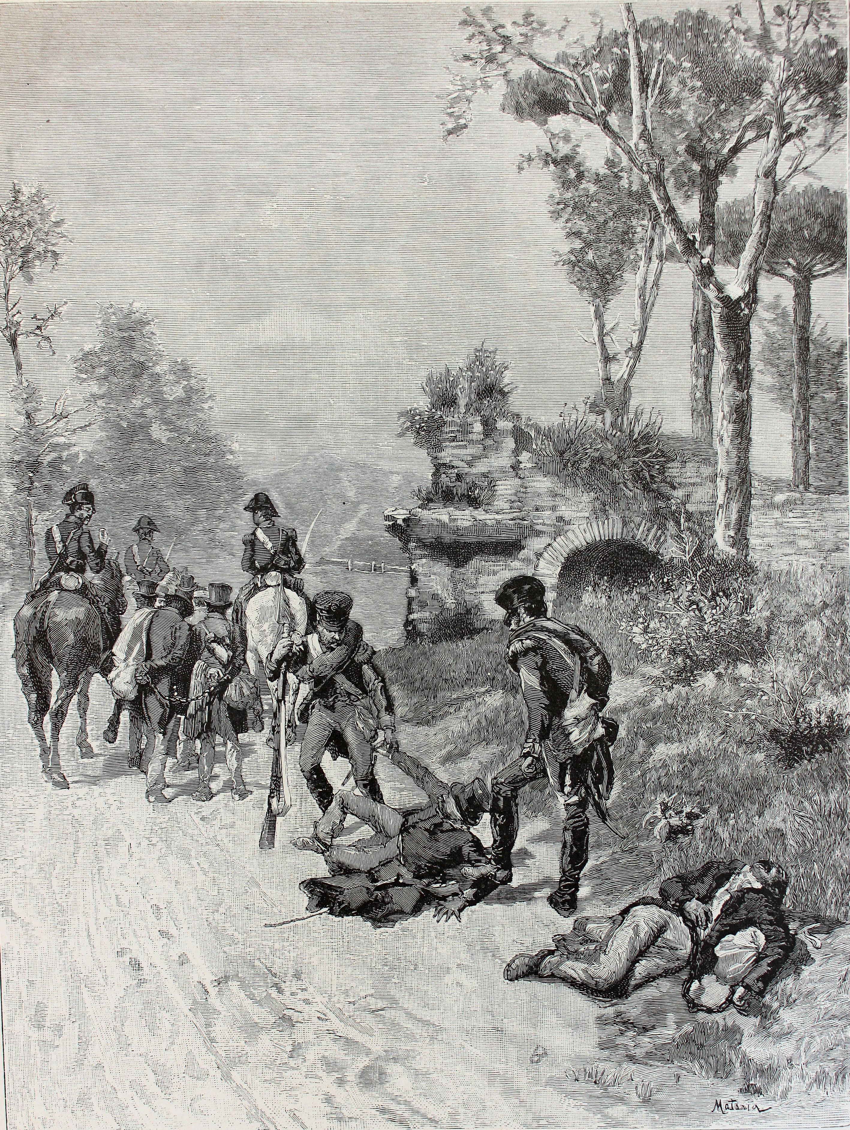 "I Rei di Stato del Cilento Estenuati e Morenti sulla via per Salerno".